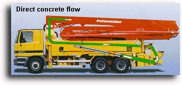 ציור סכימטי של הצנרת. התמונה באדיבות Putzmeister . את האישור ניתן למצוא כאן.